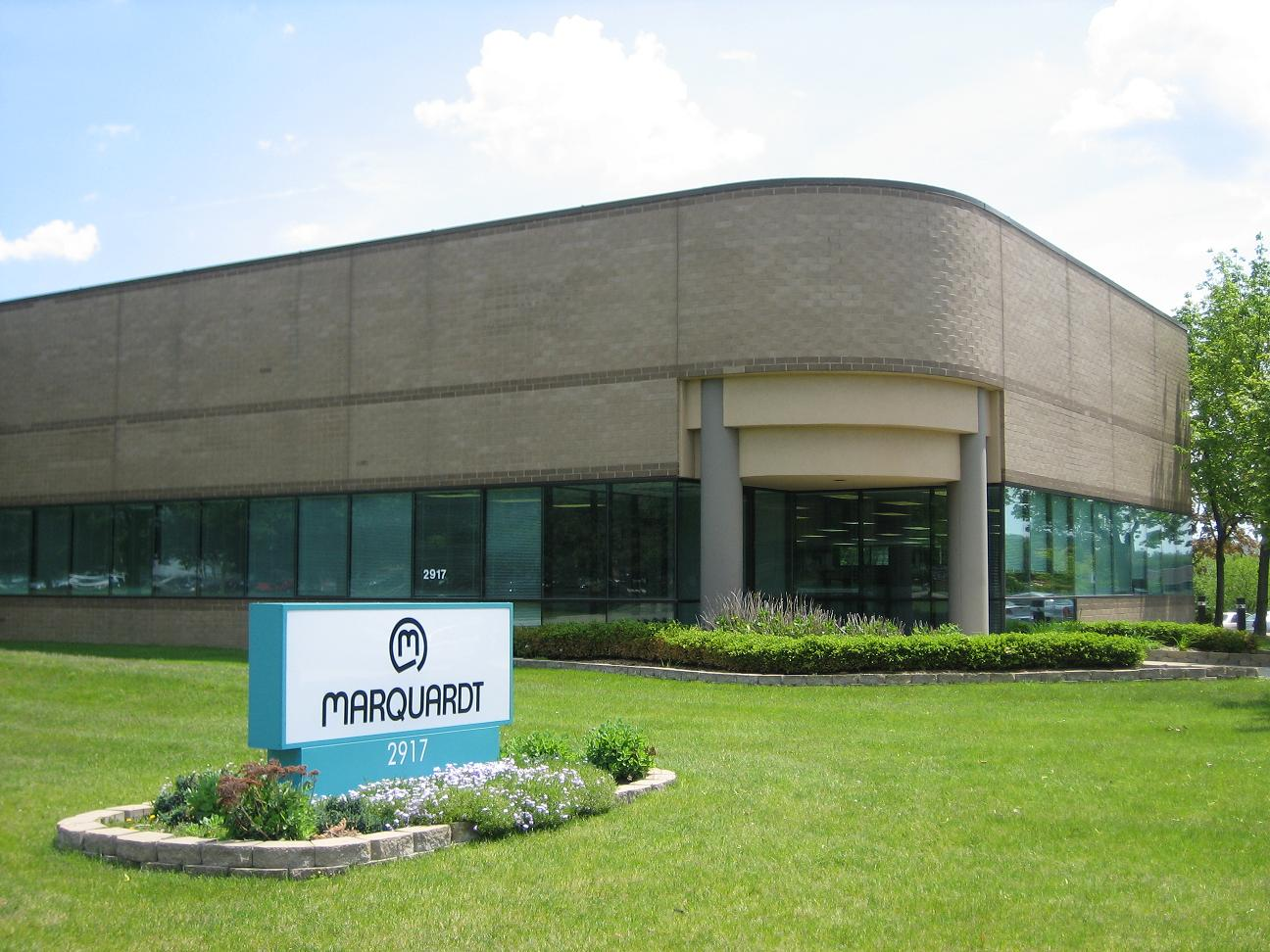 Marquardt Niederlassung in Rochester Hills